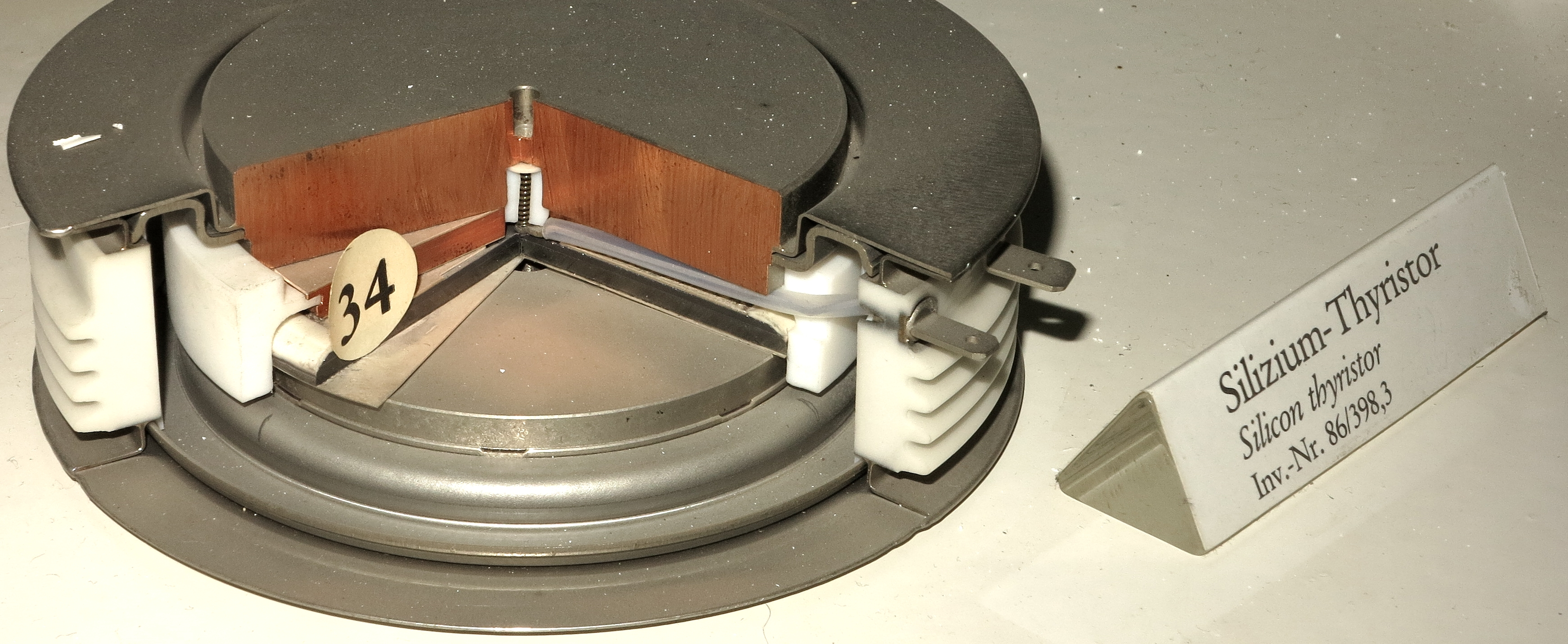 Leistungsthyristor Schnitt